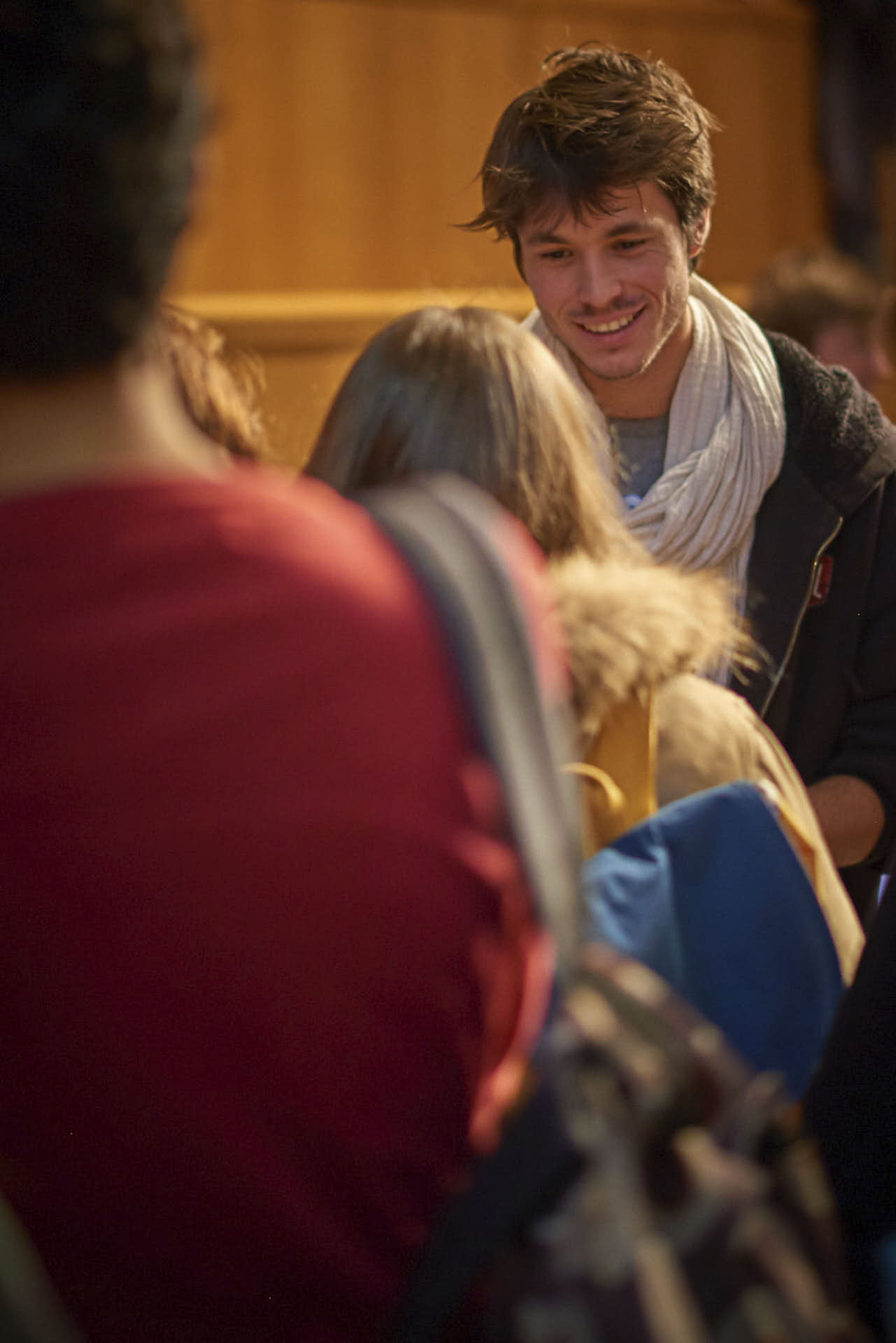 Suite à sa conférence, rencontre et discussion avec quelques fans sur Paris